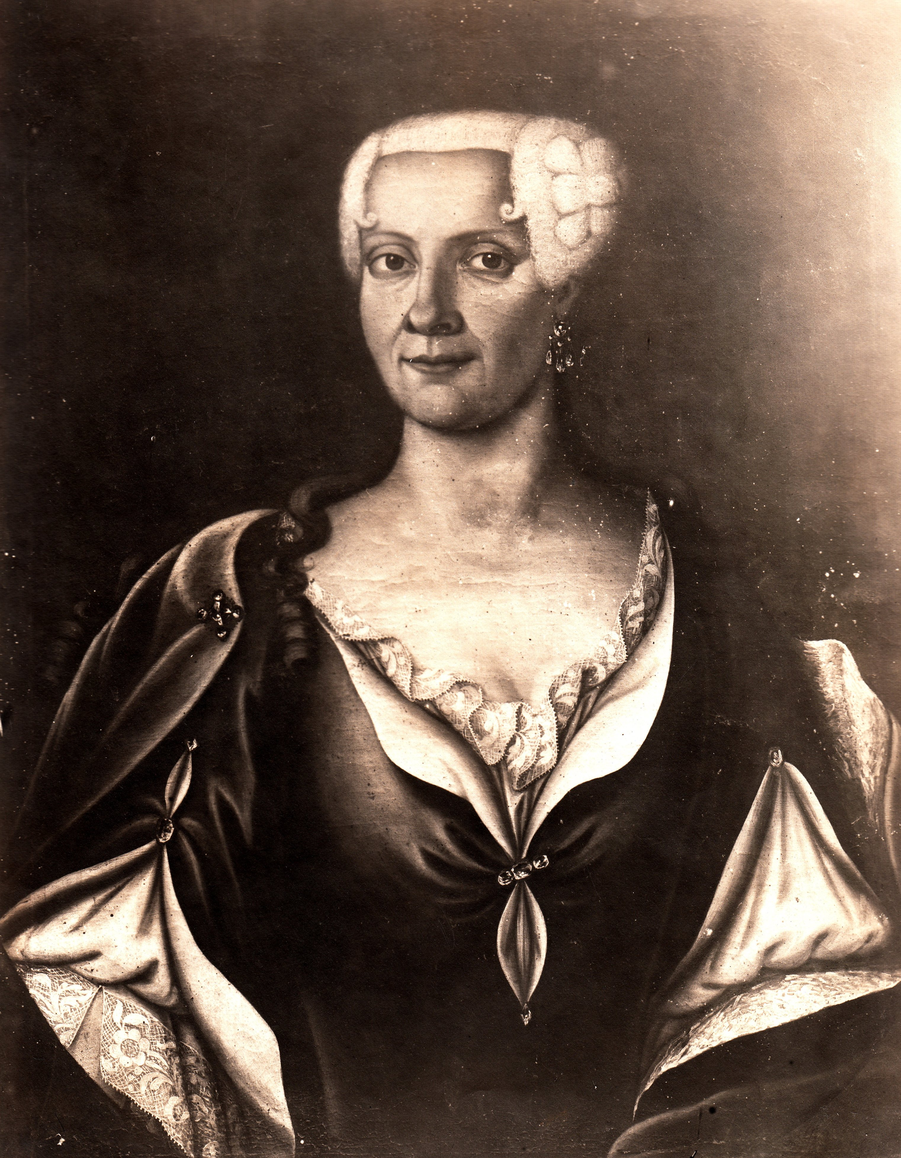 Fotograf: Erik Olsen (1835 - 1920). Format: Fotopositiv. År: 1897. Fra utstillingen i anledning Trondhjems 900-årsjubileum i 1897. Utstillingstekst i Trondhjems 900 Aars Jubilæum: Katalog for Den Historiske Udstilling i Trondhjem 1897: 720. Müller, Elisabeth Sophie, f. Irgens. OM., Brystbill. i fuld Størr., sign.: J. N. Schavenius Pinxit 1742 [dvs. malt av J. N. Schavenius 1742]. Paa Bagsiden læses: Elisabet Sophiæ Irgens, Uxor Johannæ Müllerii. Ætatis suæ 43 [dvs. Elisabeth Sophie Irgens, Johannes Müllers kone. Gjort (ved hennes alder) 43]. Fru Caroline Grønn, Levanger.